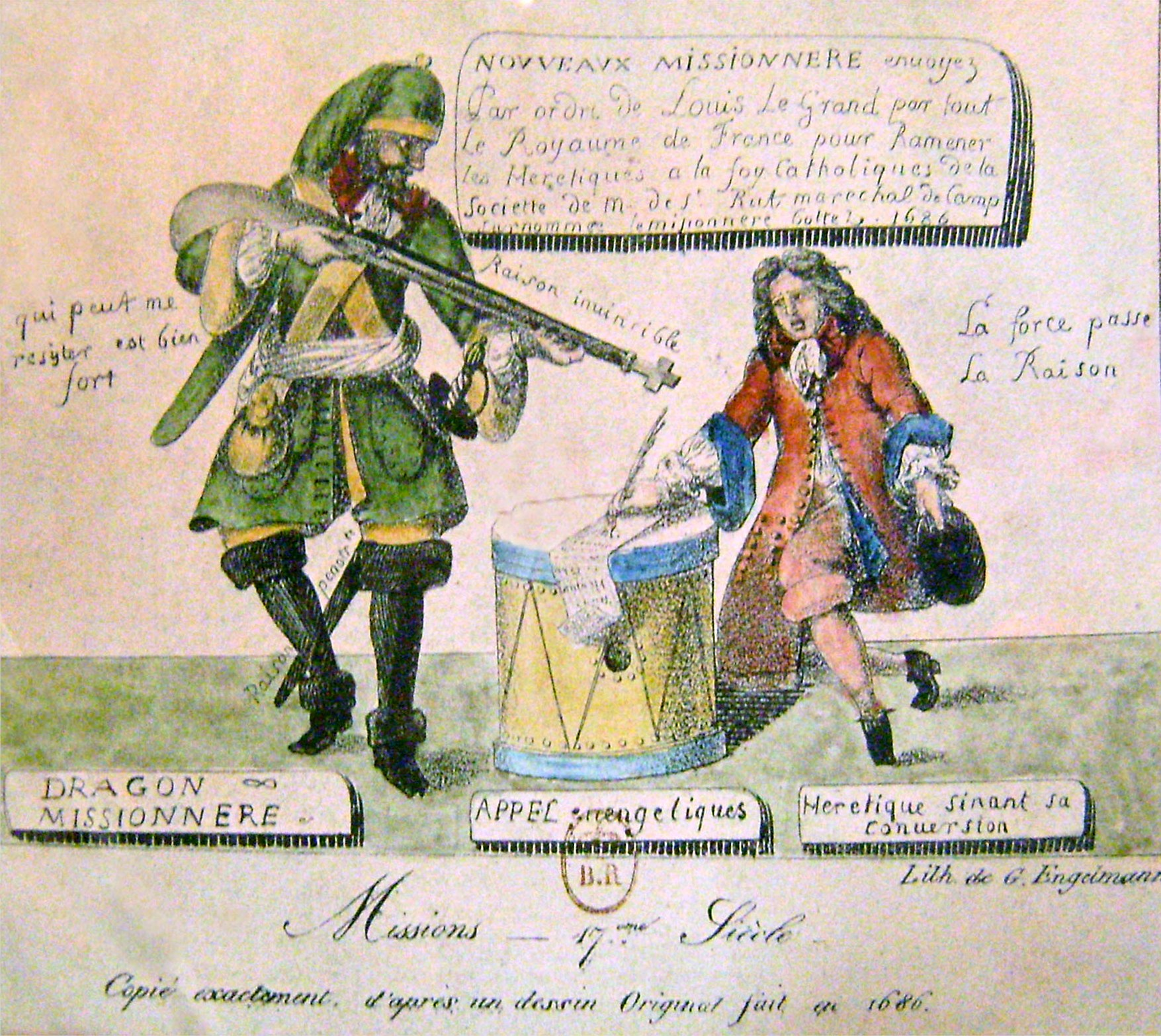 Gravure protestante représentant les dragonnades en France sous Louis XIV.